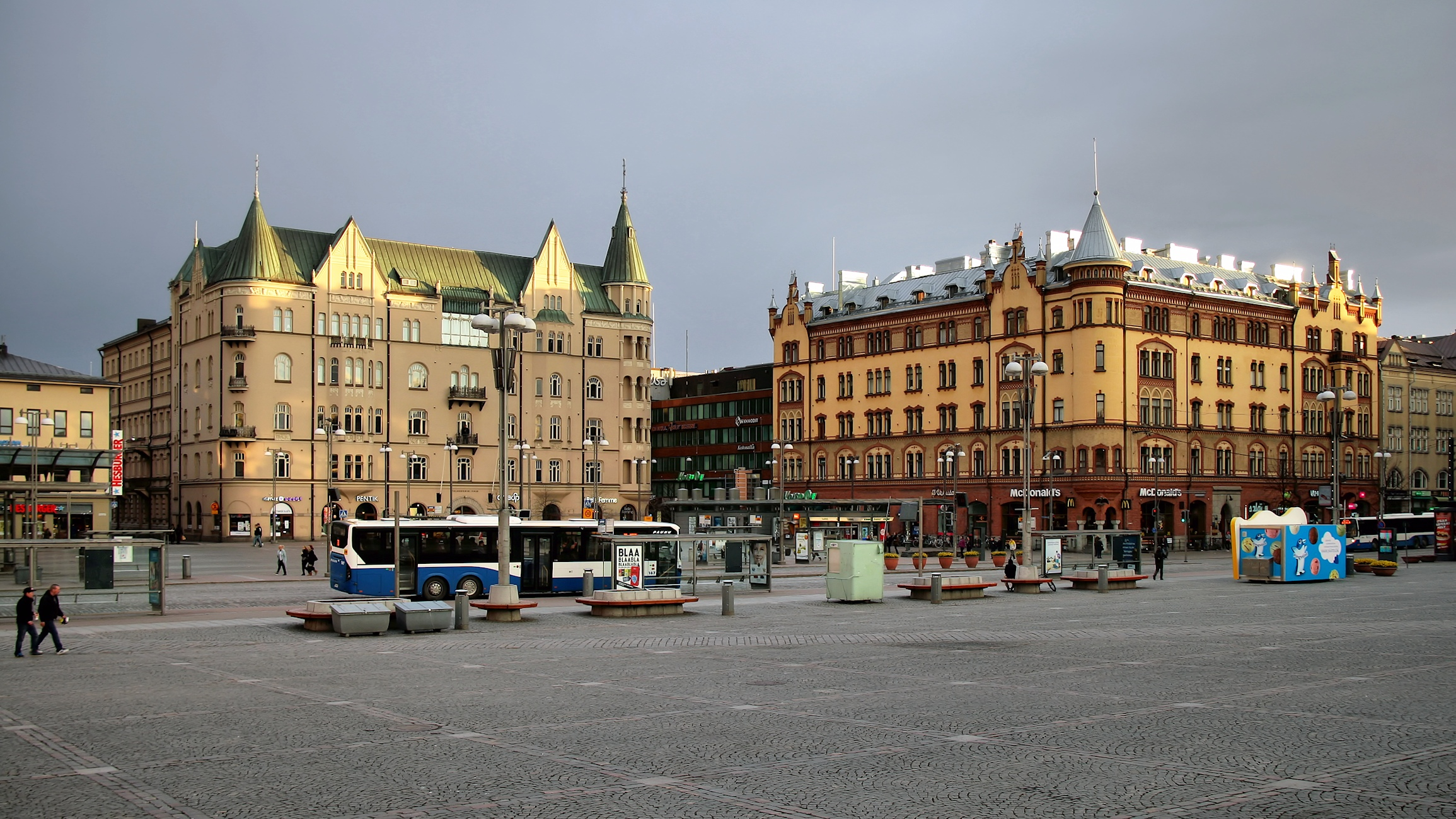 Keskustori